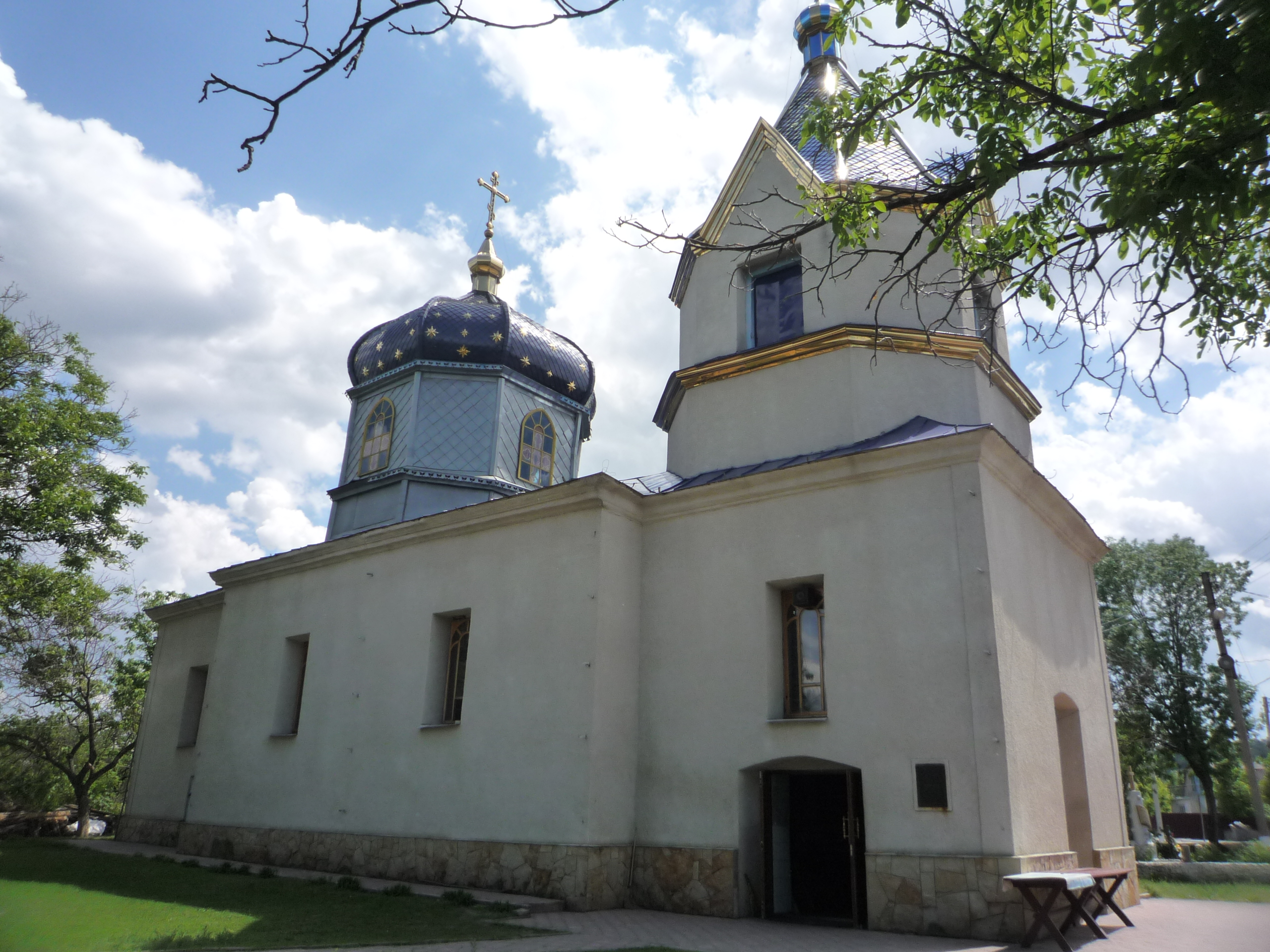 Миколаївська церква (1770 р.)